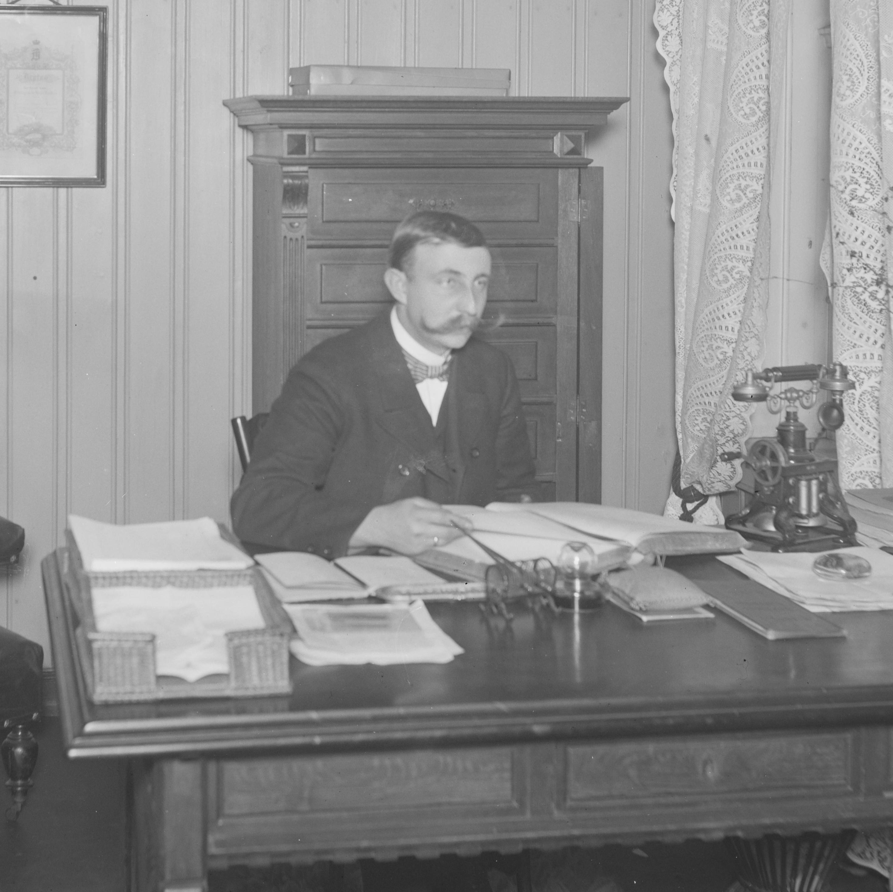 Bildet er hentet fra Nasjonalbibliotekets bildesamling. Anmerkninger til bildet var: Påskrift arkivark: Pettersen (Kontoret) Harald Pettersen [?] Eldste arkivnummer: 264, 263 Nyere arkivnummer: 22 Oslo, Oslo, Oslo